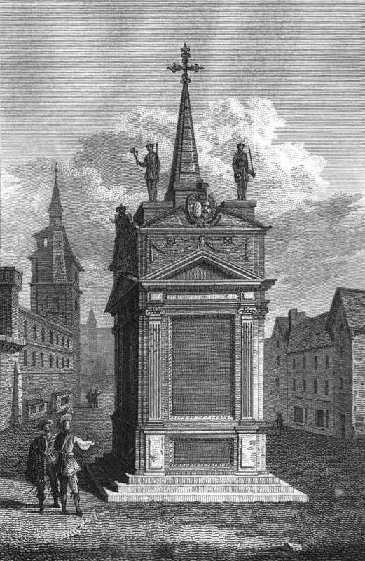 "Pyramide commémoratrice du crime de Jean Chastel et des jésuites."